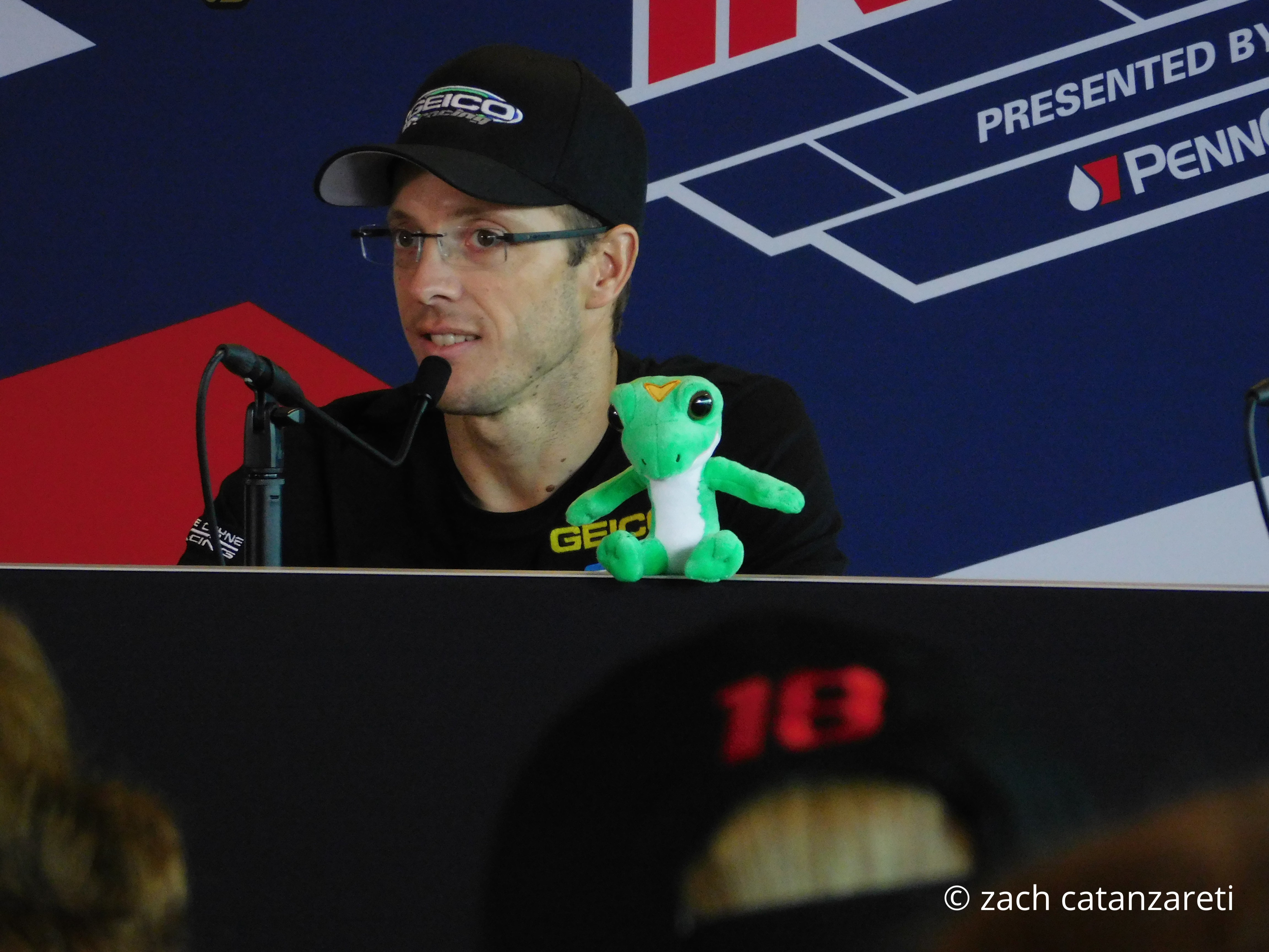 sebastien bourdais